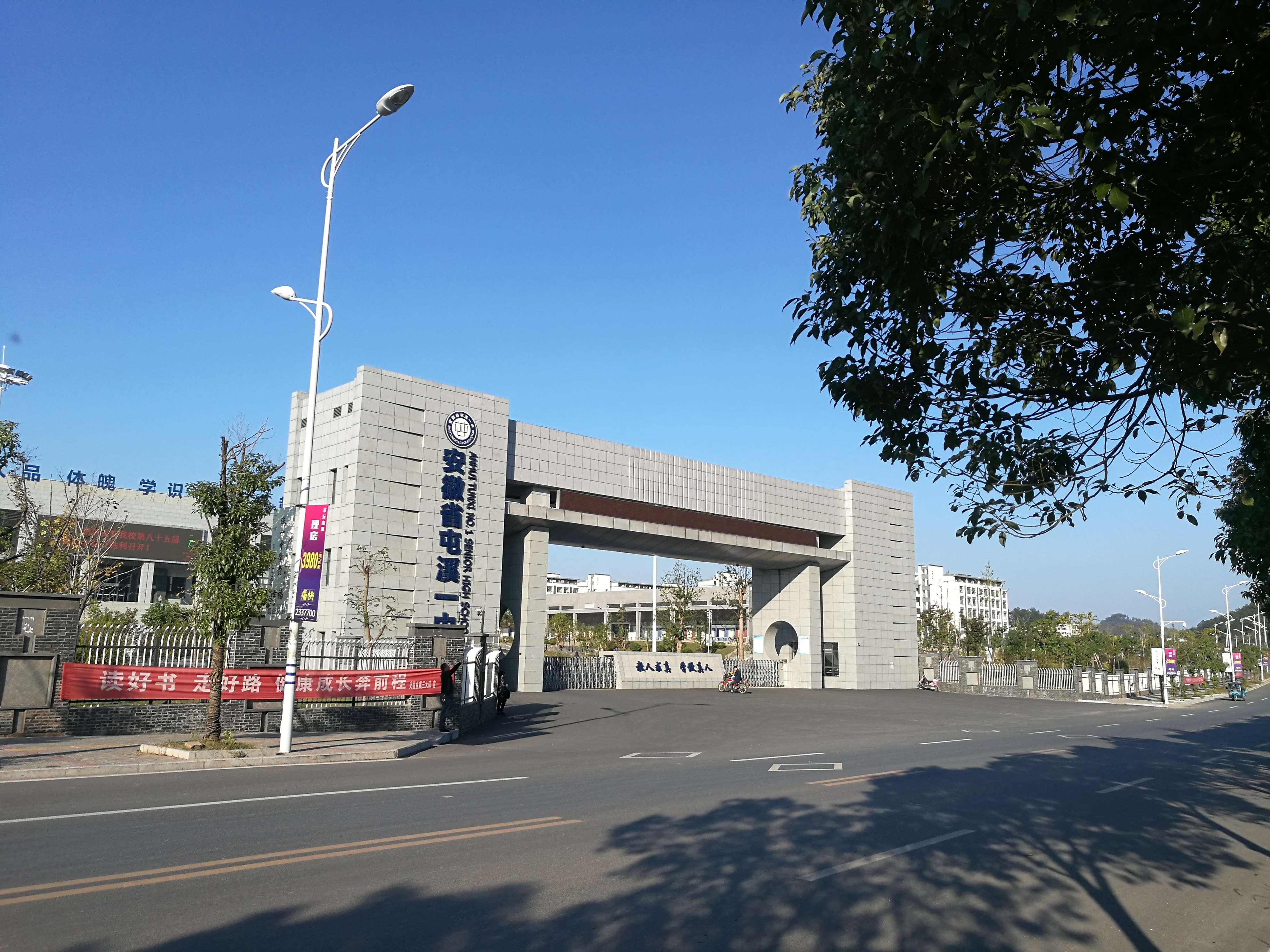 中文（中国大陆）: 安徽省屯溪一中的大门。